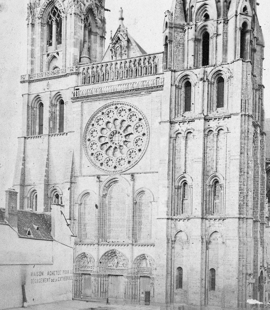 Maison achetée pour le dégagement de la cathédrale de Chartres.